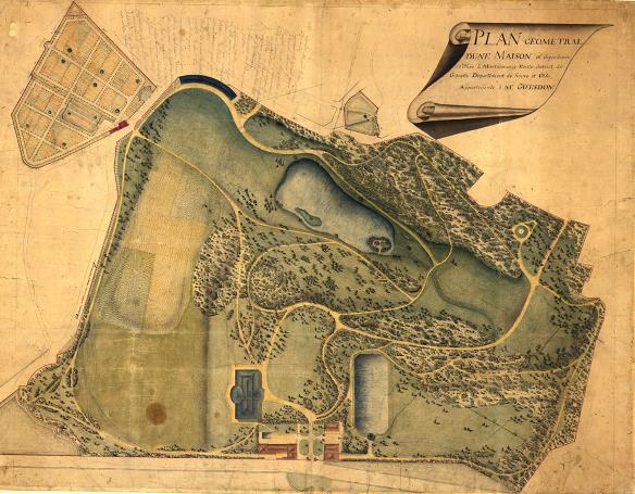 Plan du domaine vers 1790.